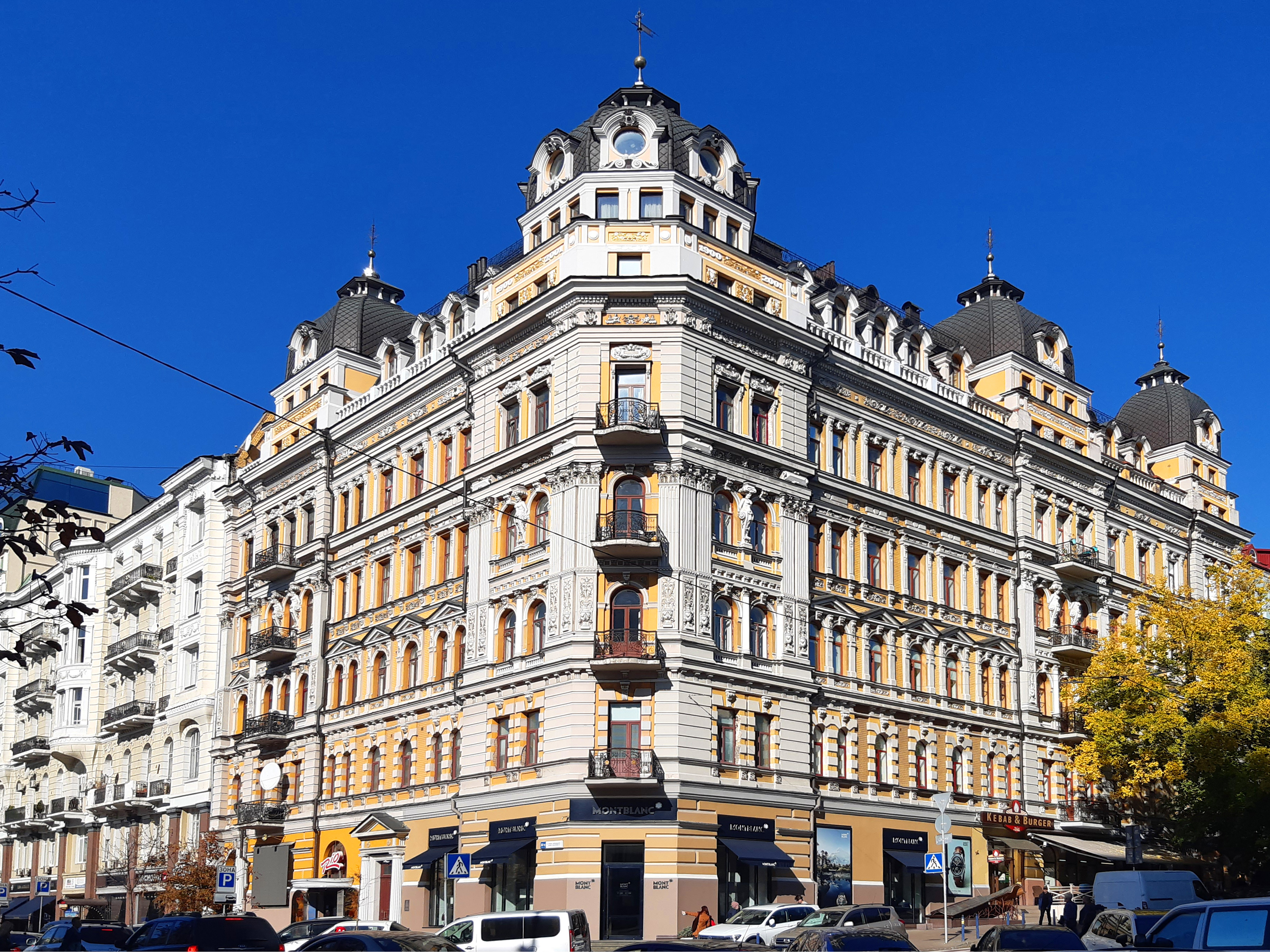 Жилий будинок, Київ, вул. Б. Хмельницького, 30/10